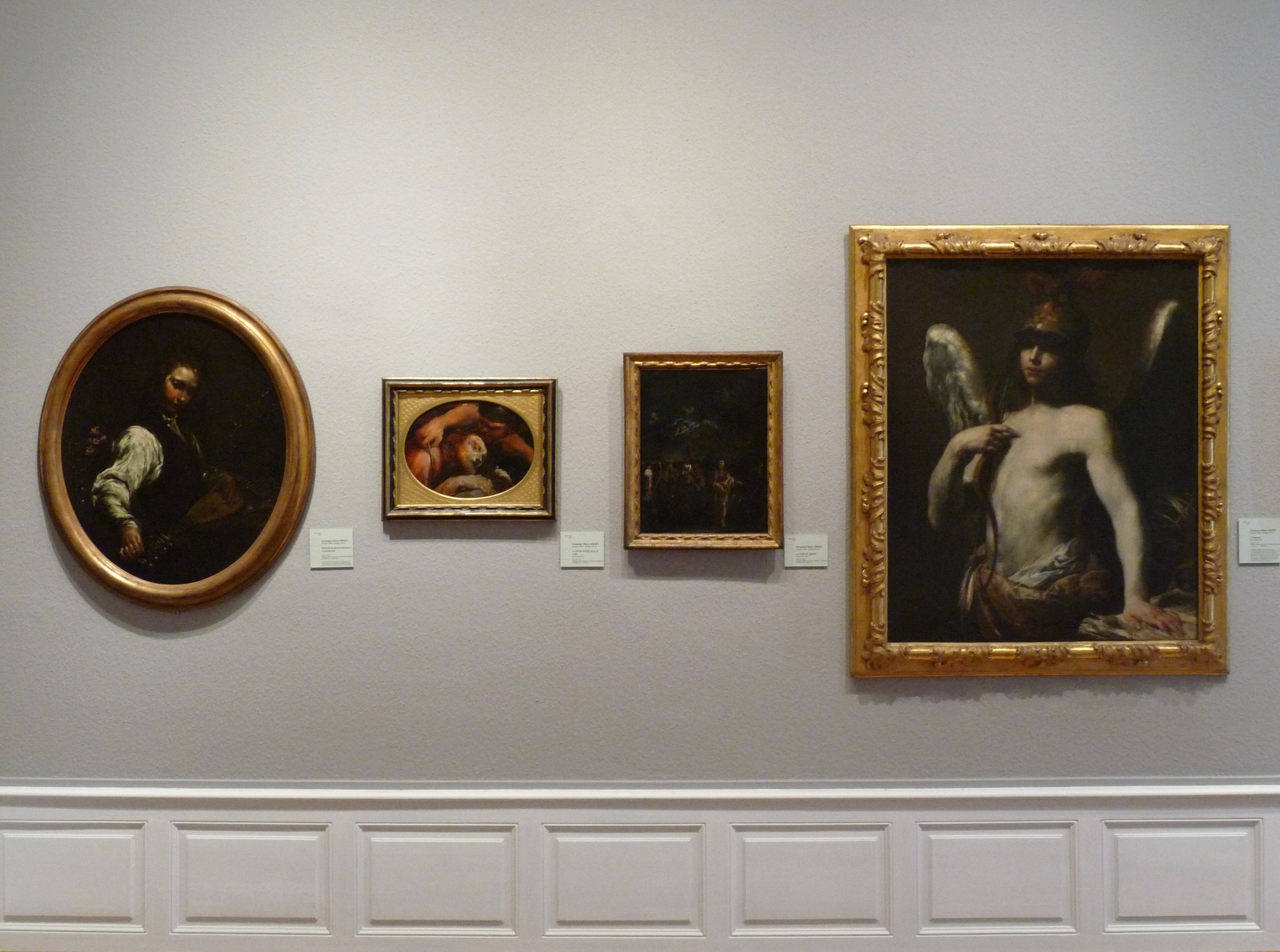 Quatre toiles de Giuseppe Maria Crespi au Musée des Beaux-Arts de Strasbourg